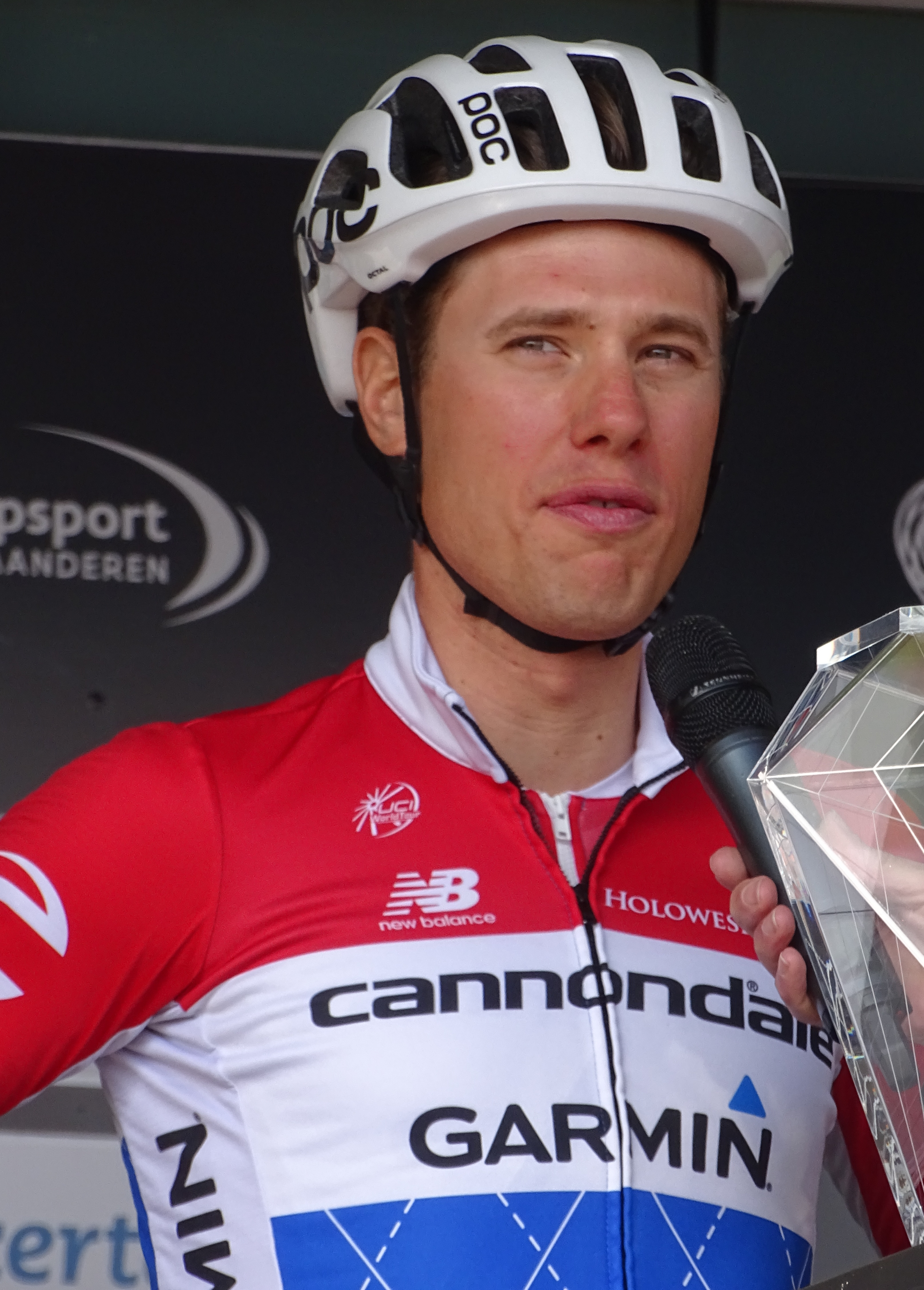 Reportage réalisé le mercredi 8 avril à l'occasion du départ du Grand Prix de l'Escaut 2015 à Anvers, Belgique.